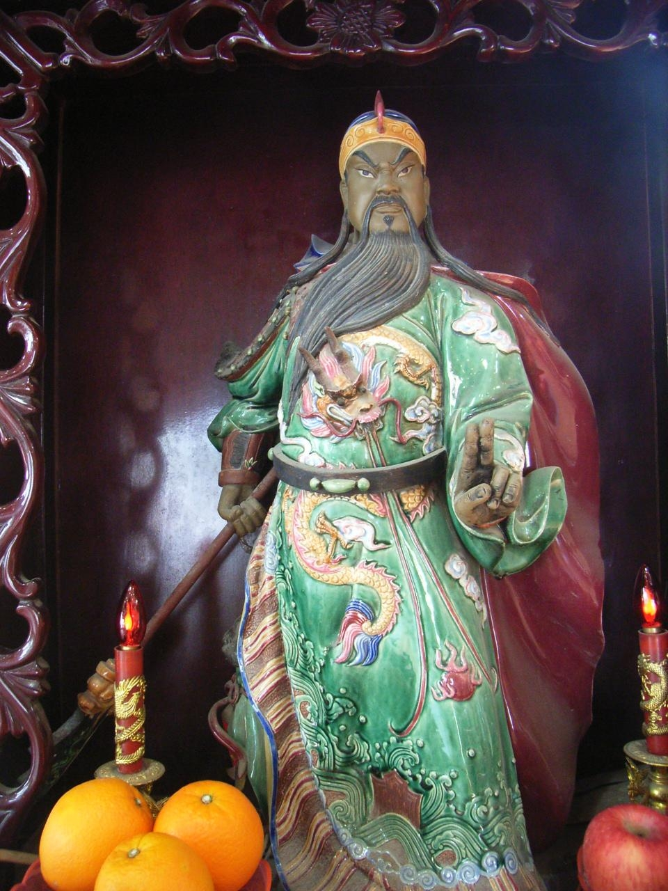 Chinese hero Kwan Kung - 關 雲 長 神 像